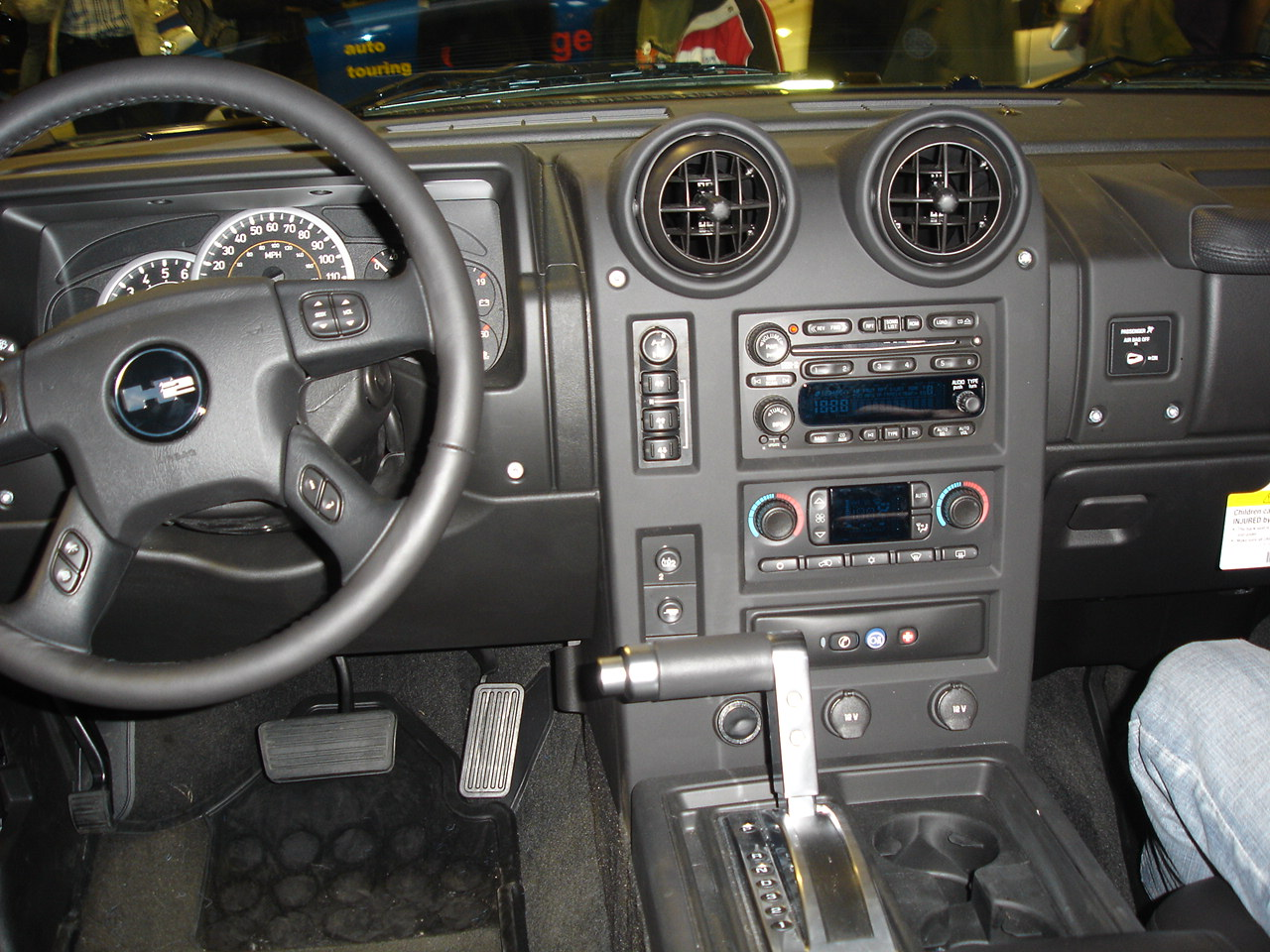 Innenraum eines Hummer H2